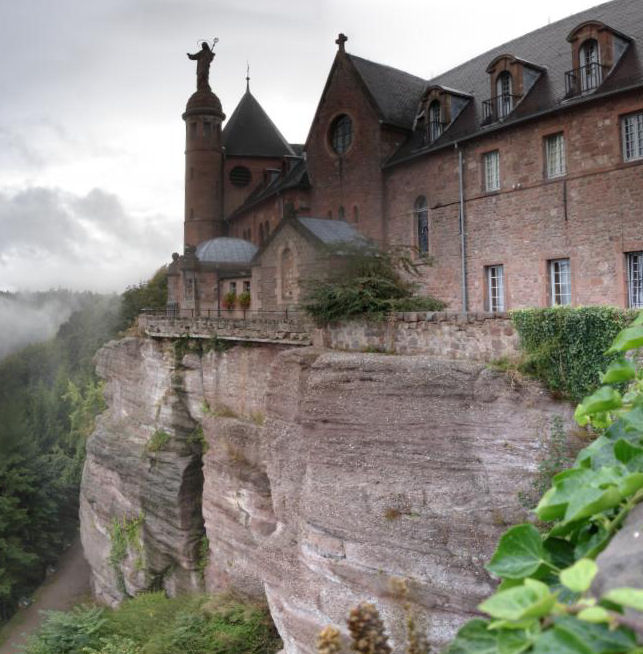 Mont Sainte-Odile. Panorama du couvent pris depuis la plateforme.